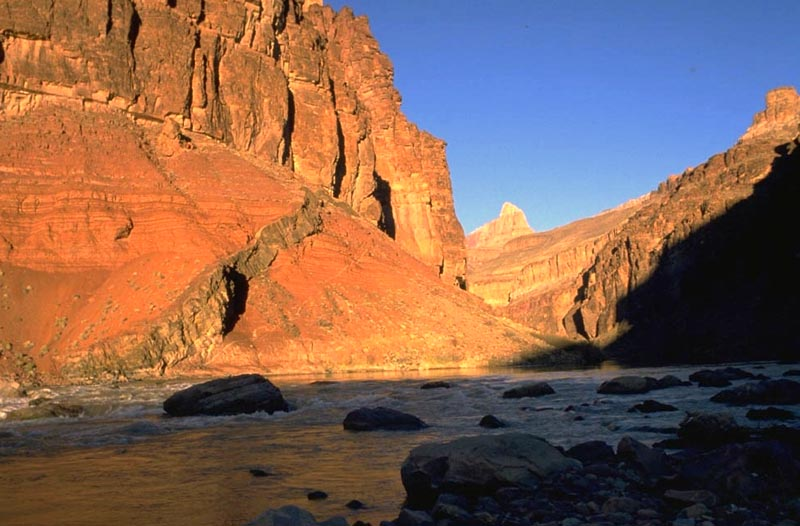 Grand Canyon Supergroup with basalt dike in Hakatai Shale